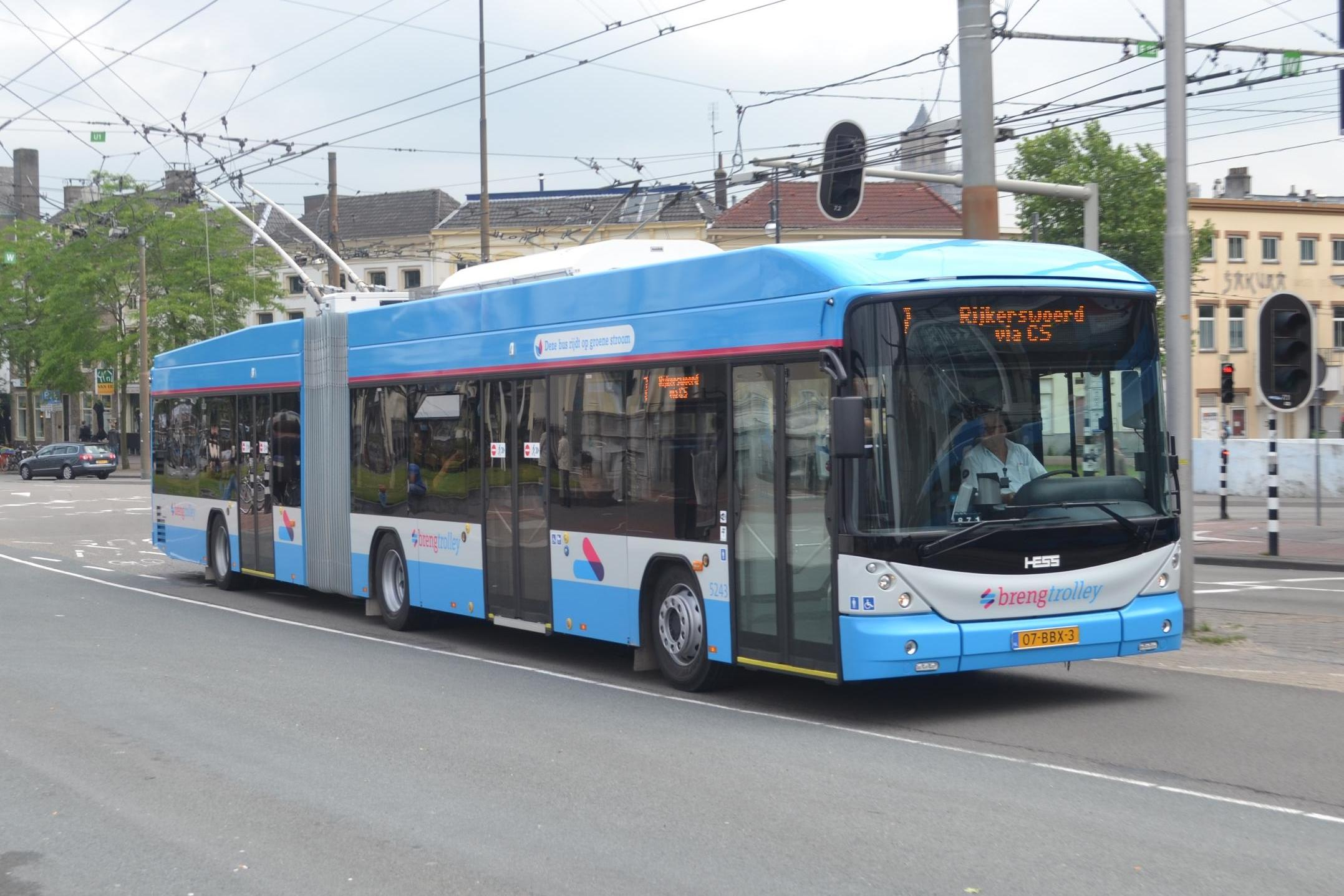 Sinds enkele dagen rijden er nieuwe Hess swisstrolleys rond in Arnhem. Hier een van de nieuwe wagens, de 5243, bij het Arnhemse station